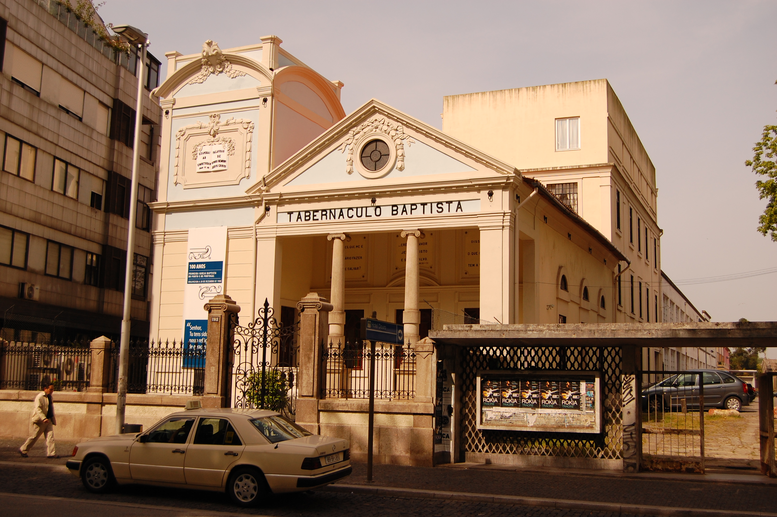 Tabernáculo Baptista / Igreja Baptista do Porto, Preaça Mousinho da Silveira (Rotunda da Boavista), freguesia de Massarelos, Porto, Portugal